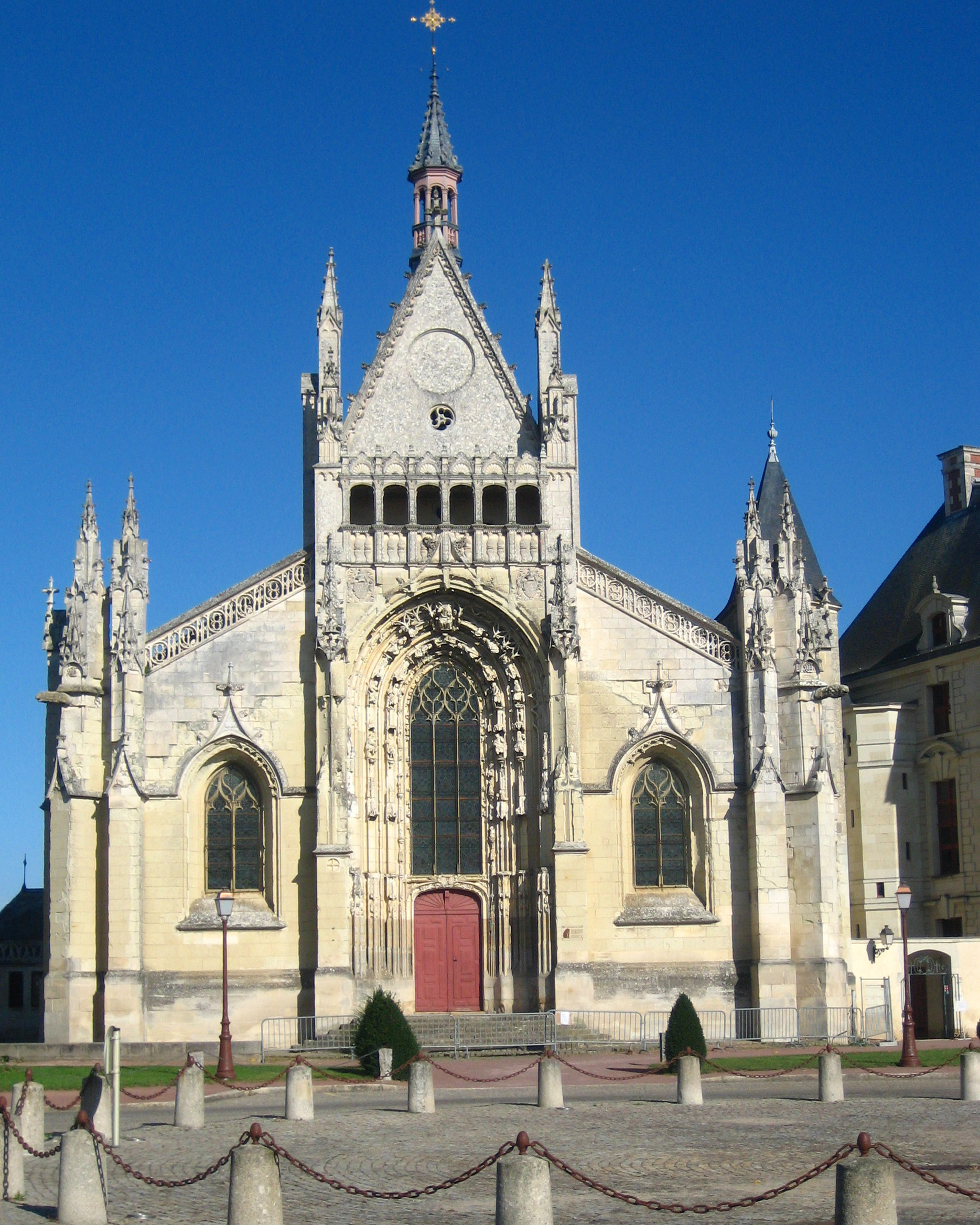 Chapelle du Château des Ducs de la Trémoïlle à Thouars .